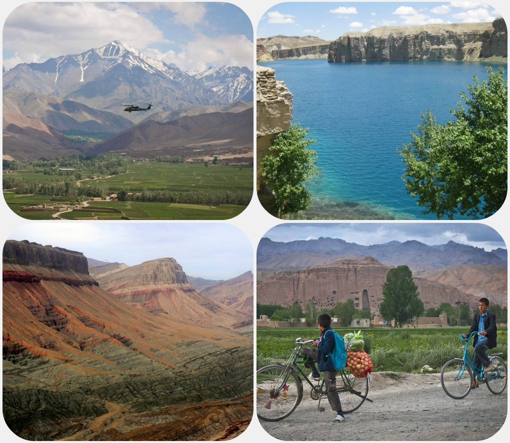 Bamyan collage